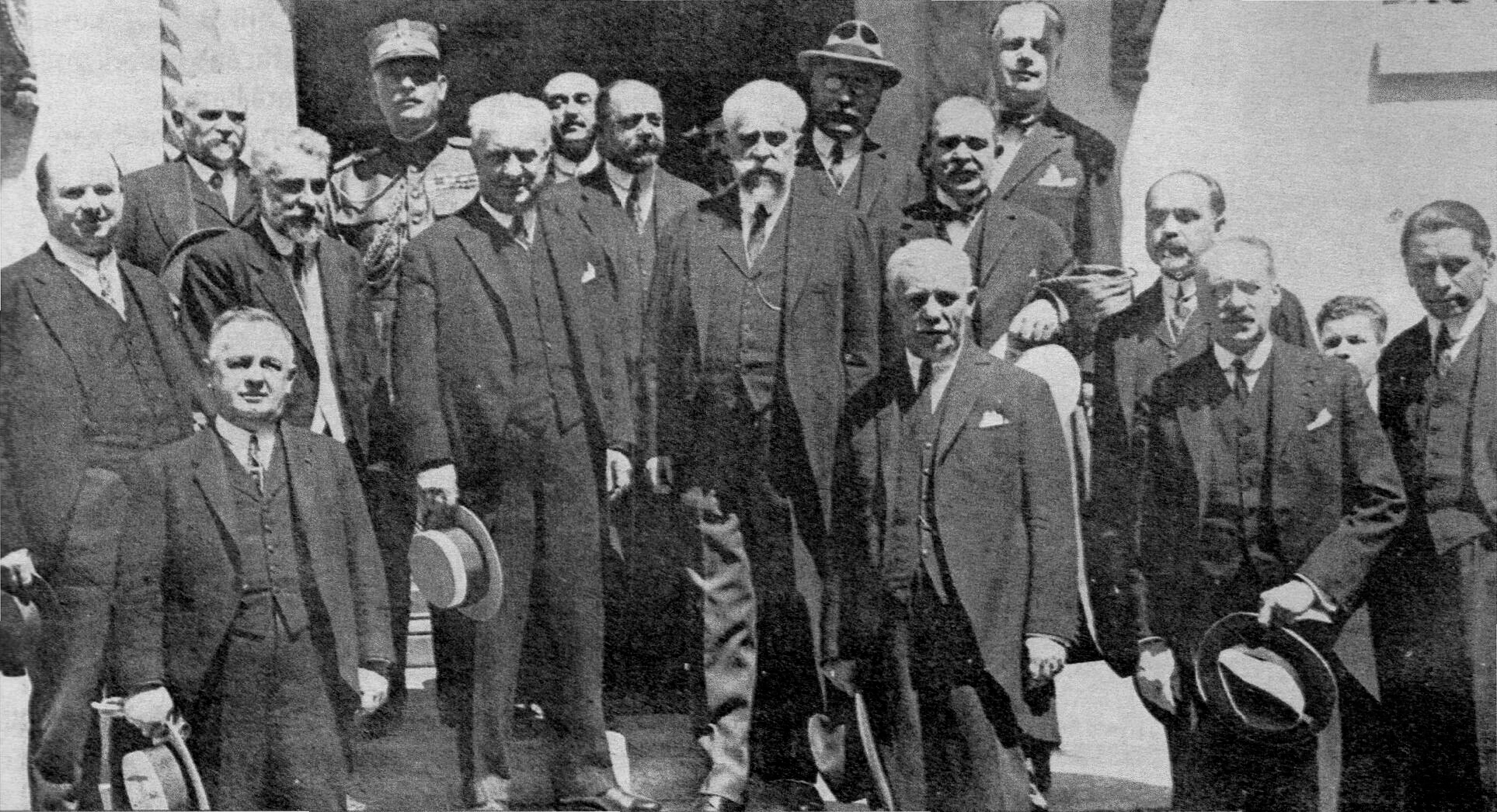 Membrii ultimului guvern Ion I.C. Bratianu, în anul 1927, la depunerea jurământului